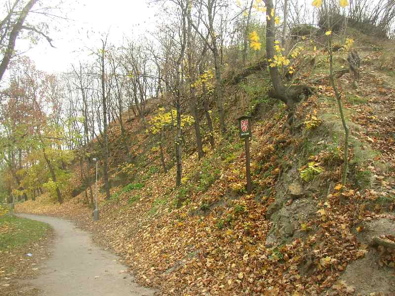 Přírodní památka Pecka v Praze. Severní úbočí obrácené k Císařskému mlýnu.